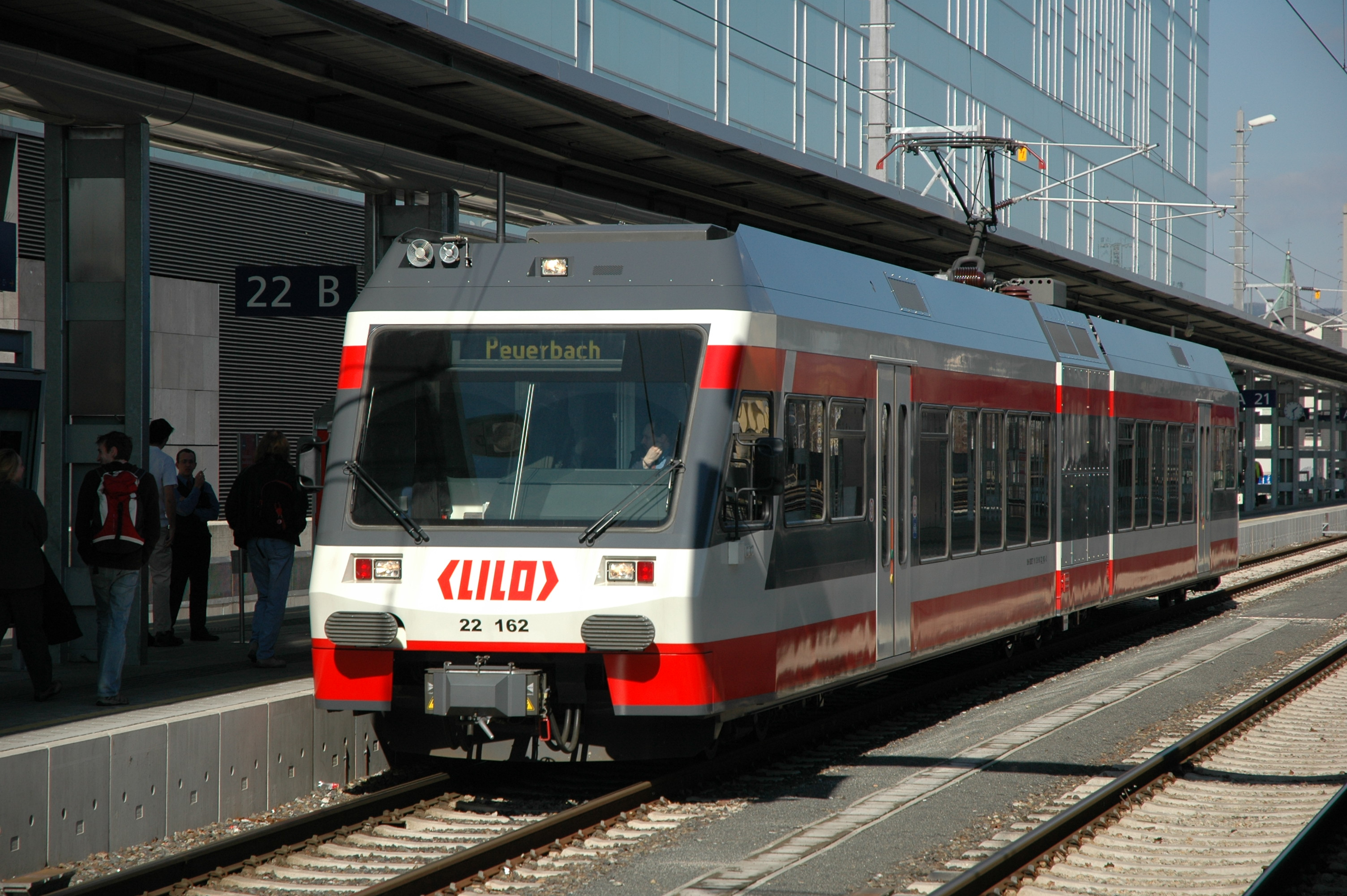 Gelenktriebwagen (GTW) der "Stadler Rail". Wagen 22 162 der Linzer Lokalbahn, am Bahnsteig 21 des Linzer Hauptbahnhofes.